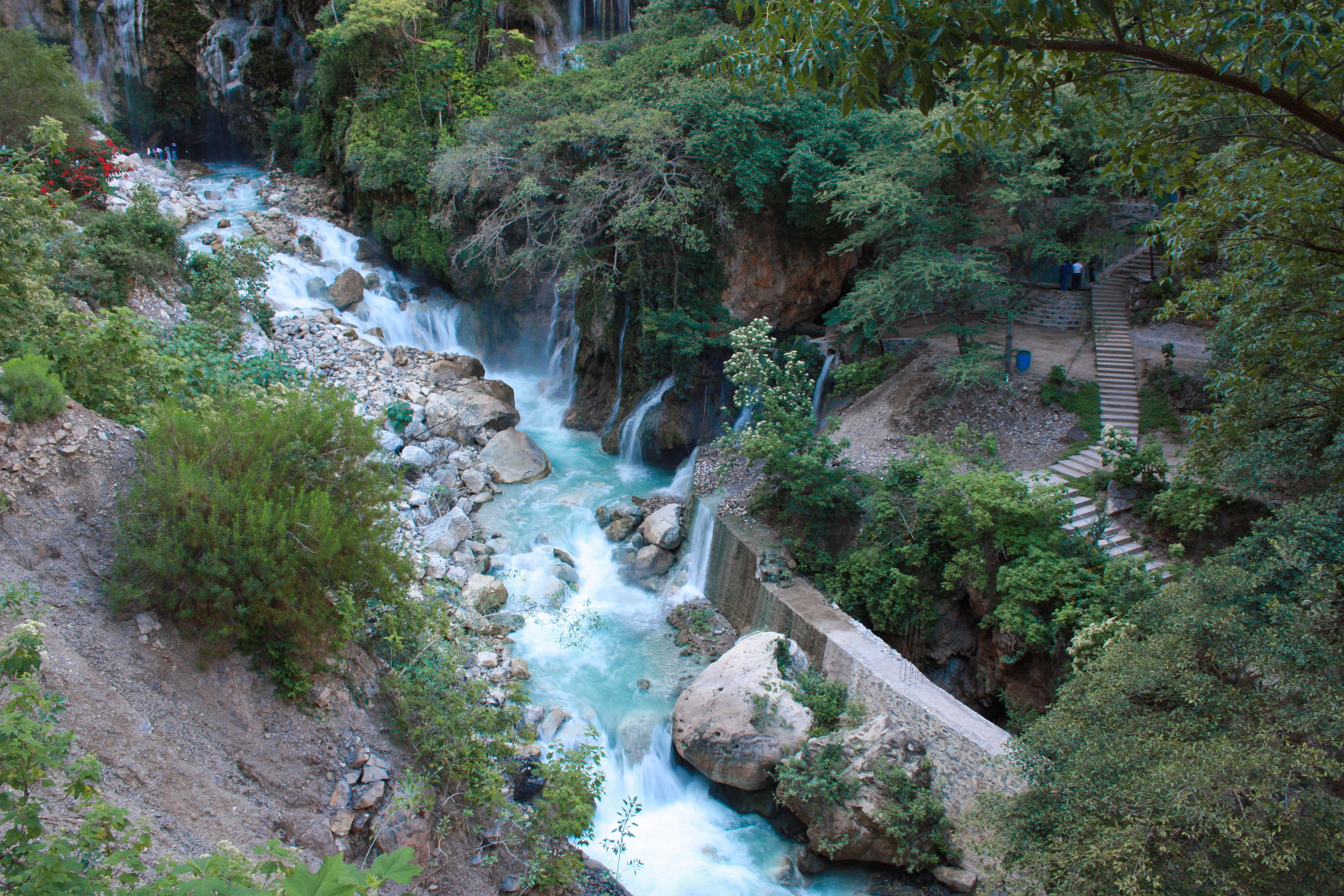 Un río de agua calentada por el corázon de la tierra